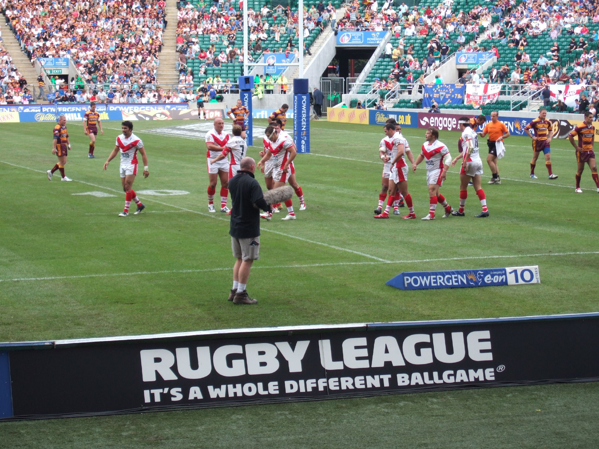 St Helens contre Huddersfield Giants en finale de la coupe d'Angleterre de rugby à XIII en 2006